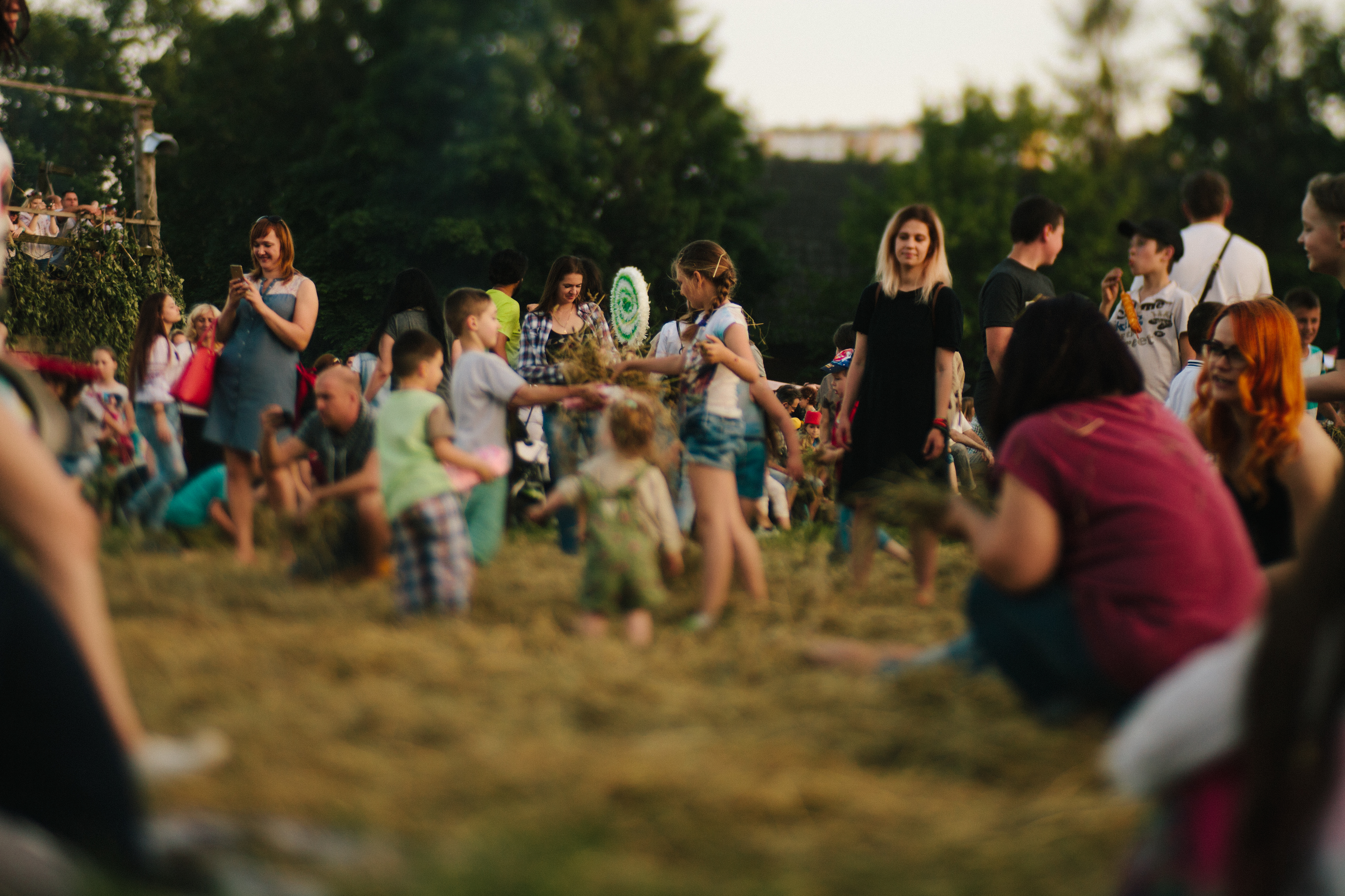 Фестивалимо! Обнова-фест 2017 (автор Я. Пукас)